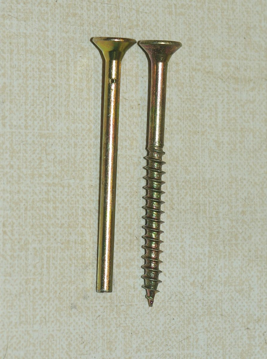 Spanplattenschrauben 5x60, ein Rohling ohne und eine fertige Schraube mit Gewinde.